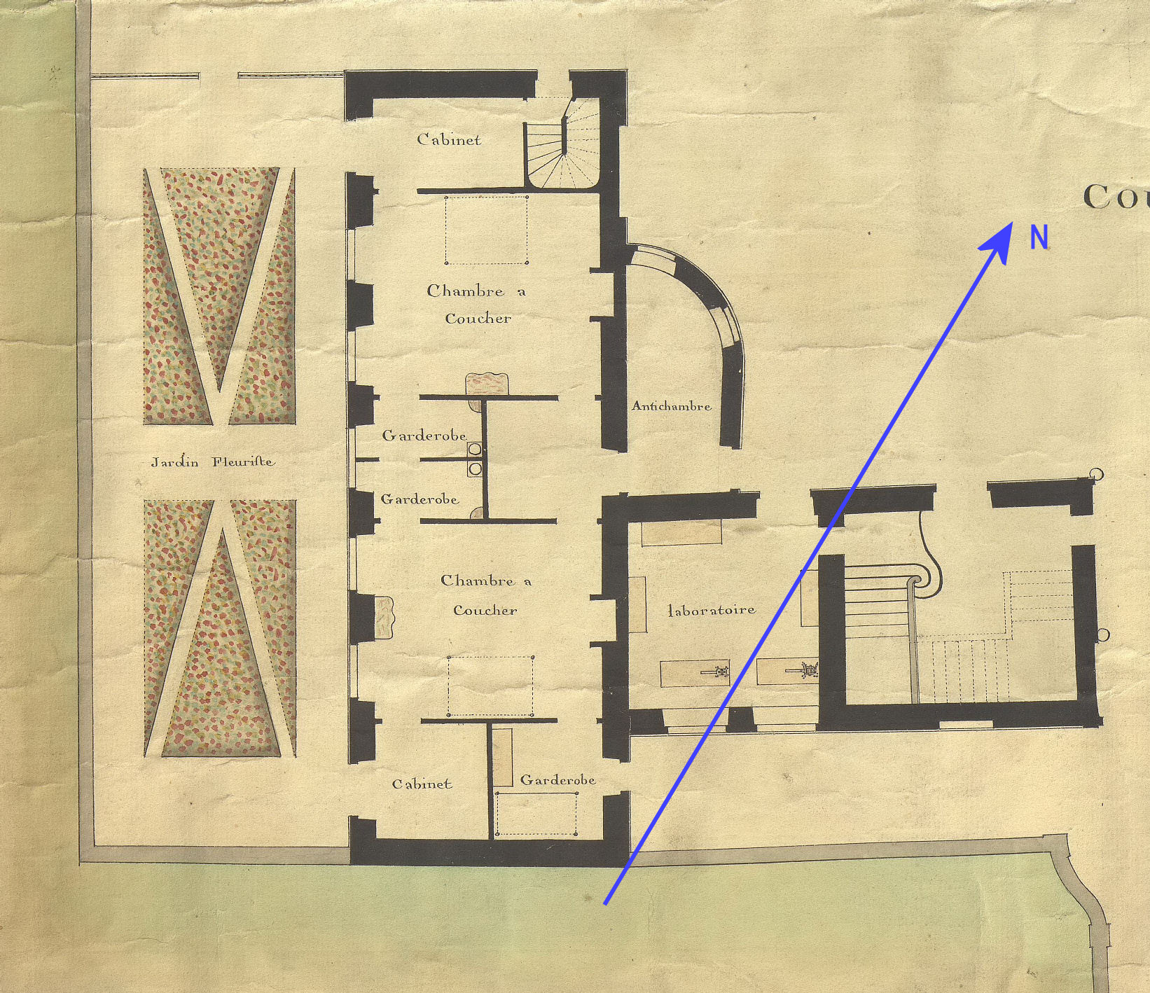 Localisation improbable de la méridienne dans le château de Sommervieu.